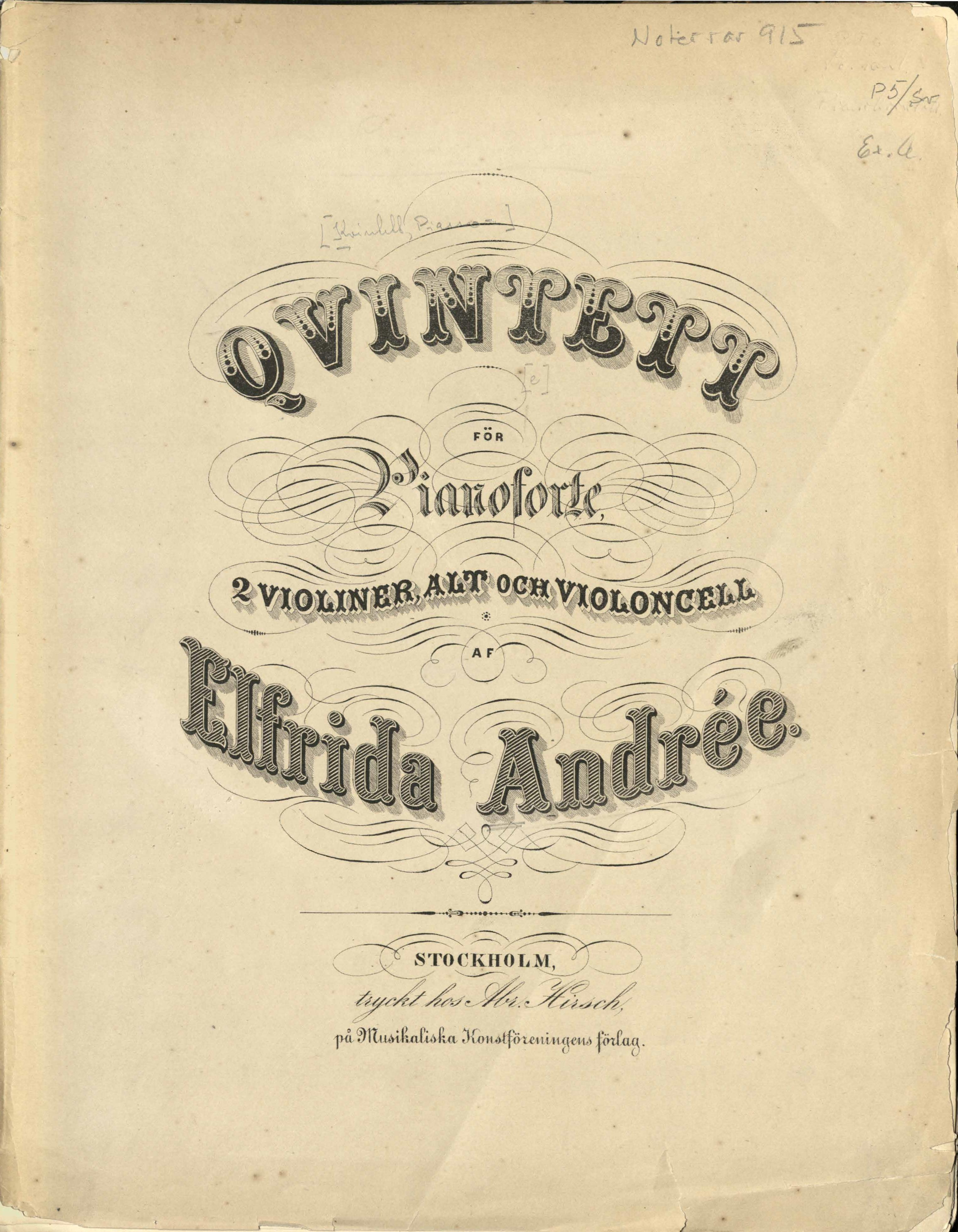 Försättsblad till Elfrida Andrées pianokvintett i e-moll. Publicerad av Musikaliska Konstföreningen 1865. Digitalt återgiven Statens musikverk. Musik- och teaterbiblioteket, 2016.